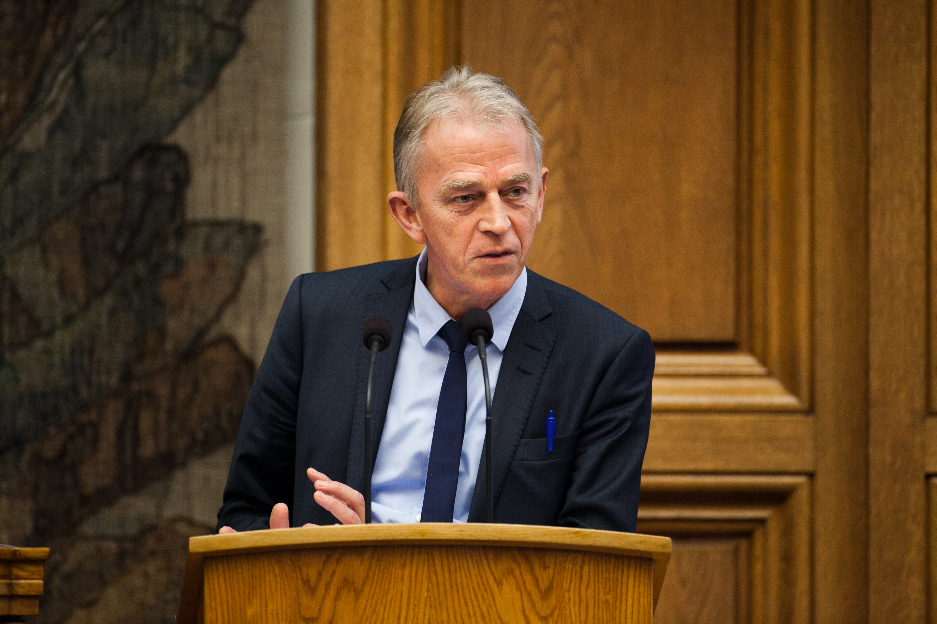 Danmarks utrikesminister Villy Søvndahl vid Nordiska Rådets session 2011 i Köpenhamn.